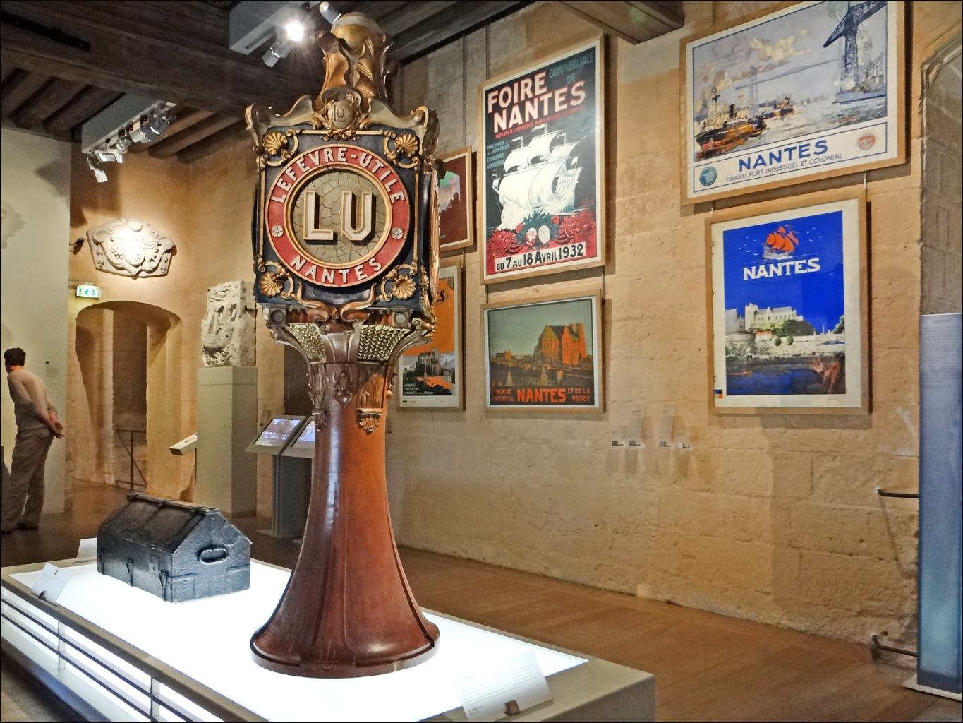 Salle 8 du Grand Logis En 1882, Louis Lefèvre-Utile prend la direction de l'entreprise familiale et transforme la petite pâtisserie en une usine importante qui fera la renommée de la ville de Nantes dans le domaine des biscuits. C'est lui qui a créé la marque LU, acronyme de Lefèvre-Utile. (extrait du cartel) Site du Château-musée